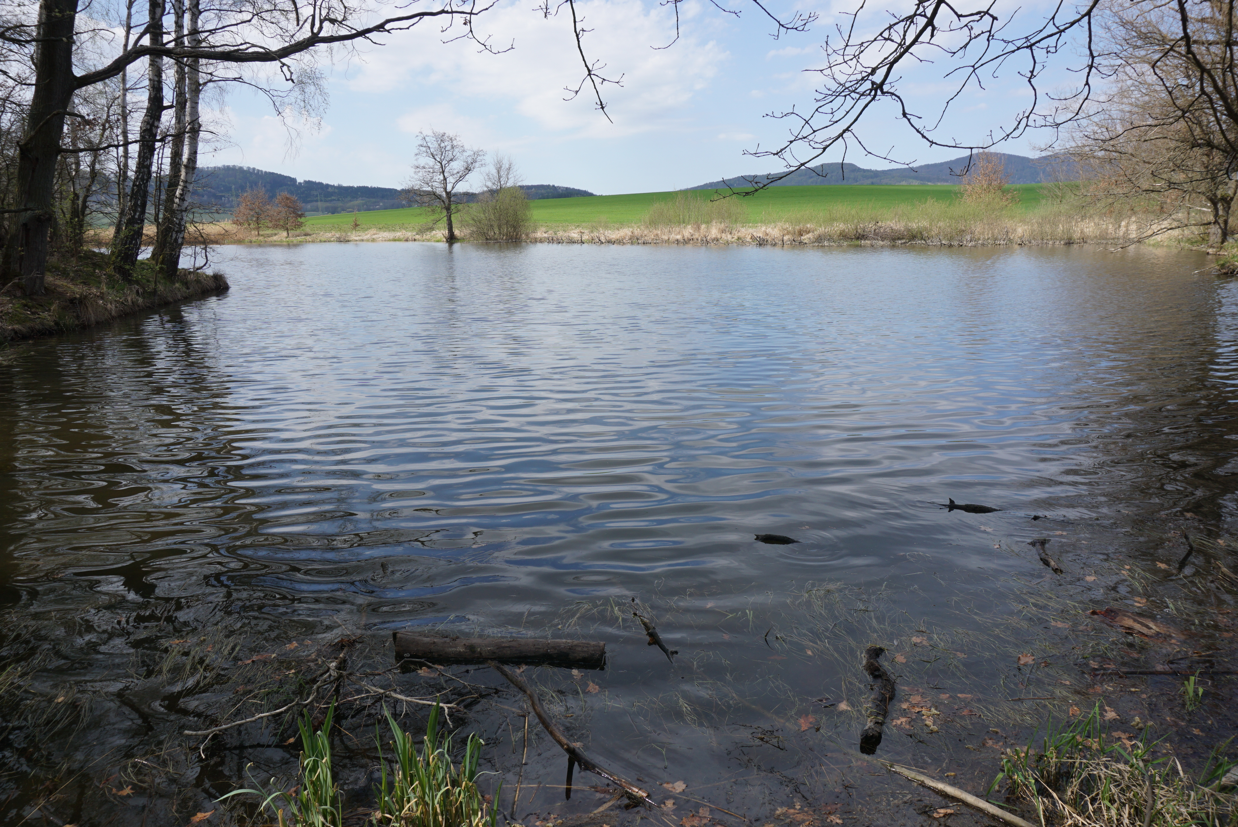 PP Cihelenské rybníky (duben 2020)